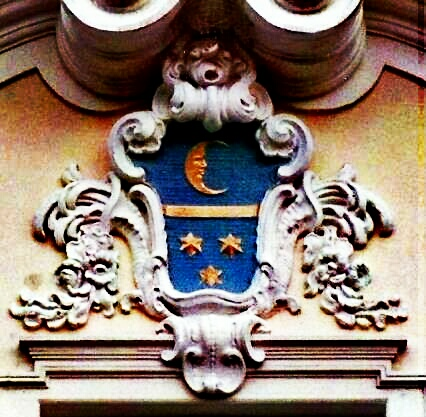 Wappen der Familie Kuhlenkamp